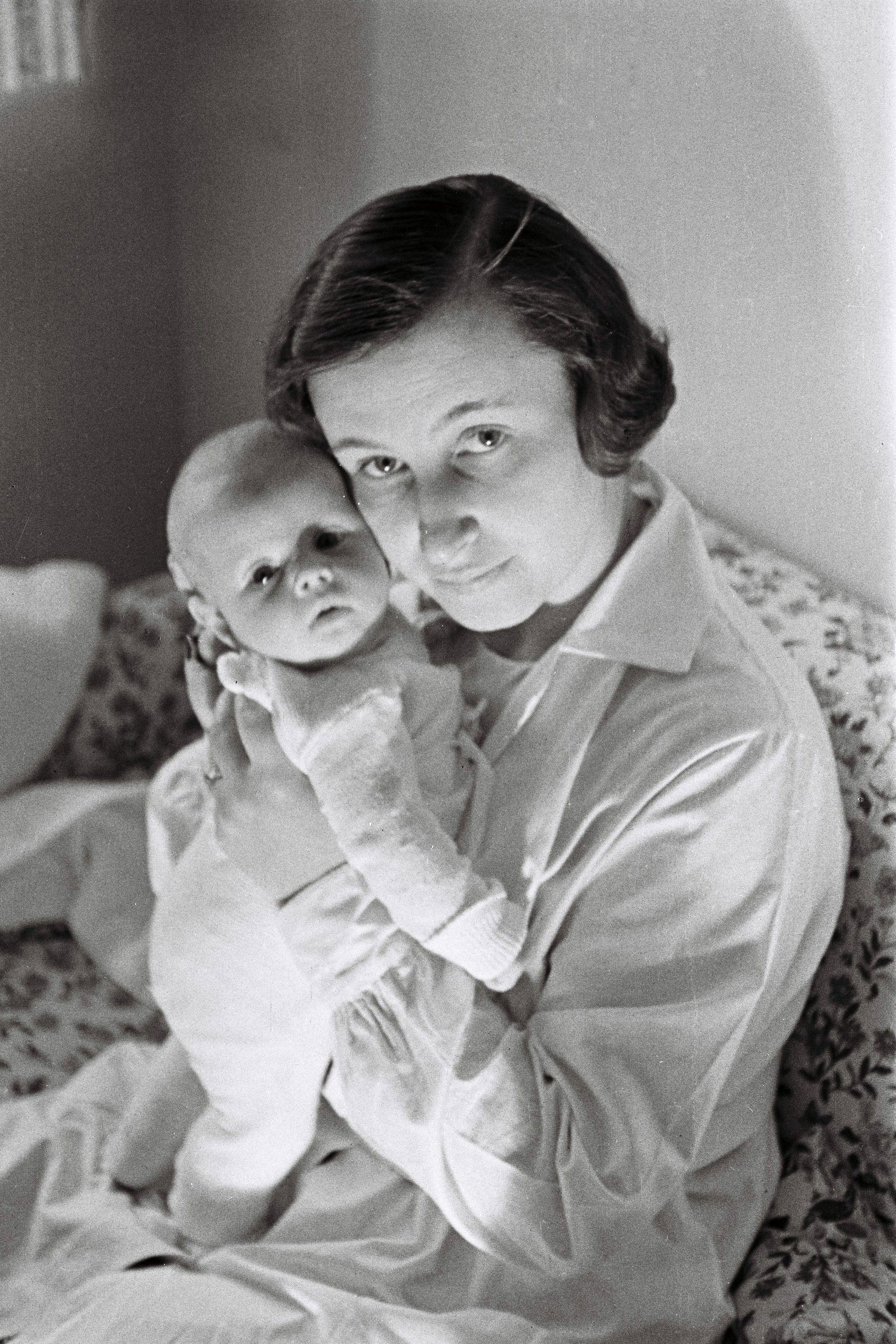 Hannes Maria Flach (1901-1936): Ilse Metzger (geb. Salberg) mit ihrer Tochter Brigitte (geb. am 23.Januar 1932 in Köln) in der Villa Marienburger Straße 16, Köln 1932